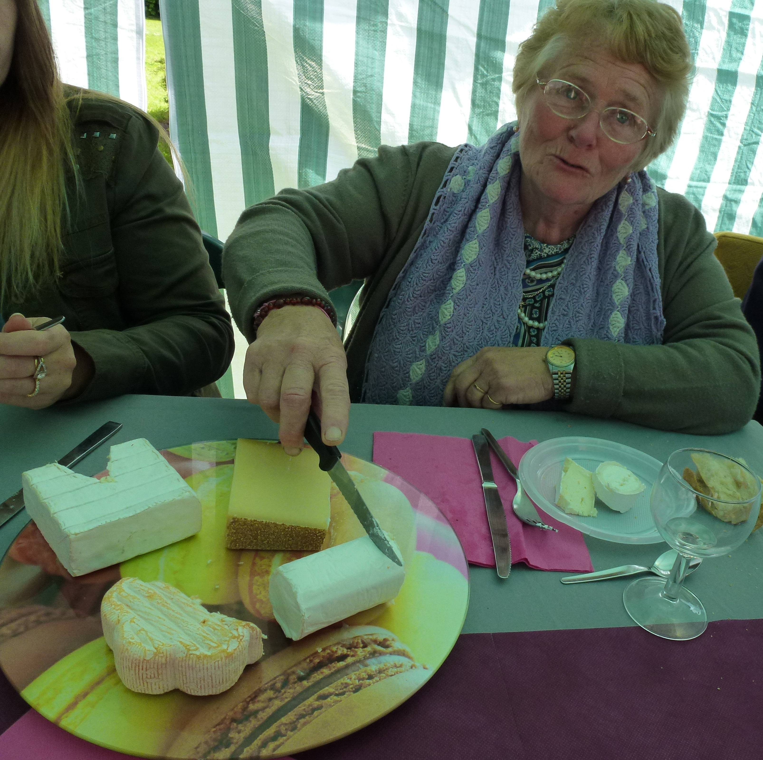 Un plateau de fromage (Rouge-Perriers, Eure, Fr)